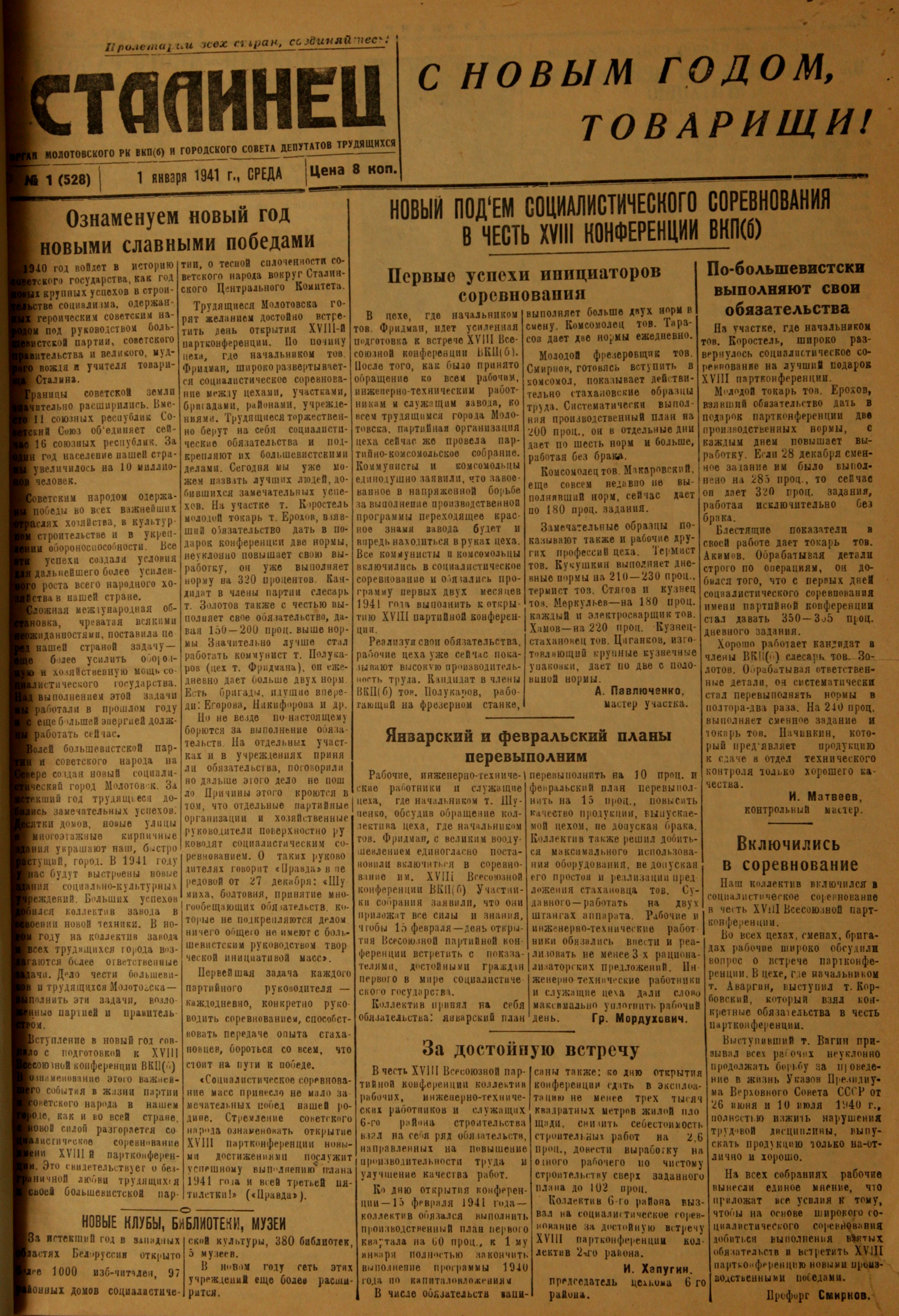 Газета «Сталинец» (ныне «Северный рабочий»)